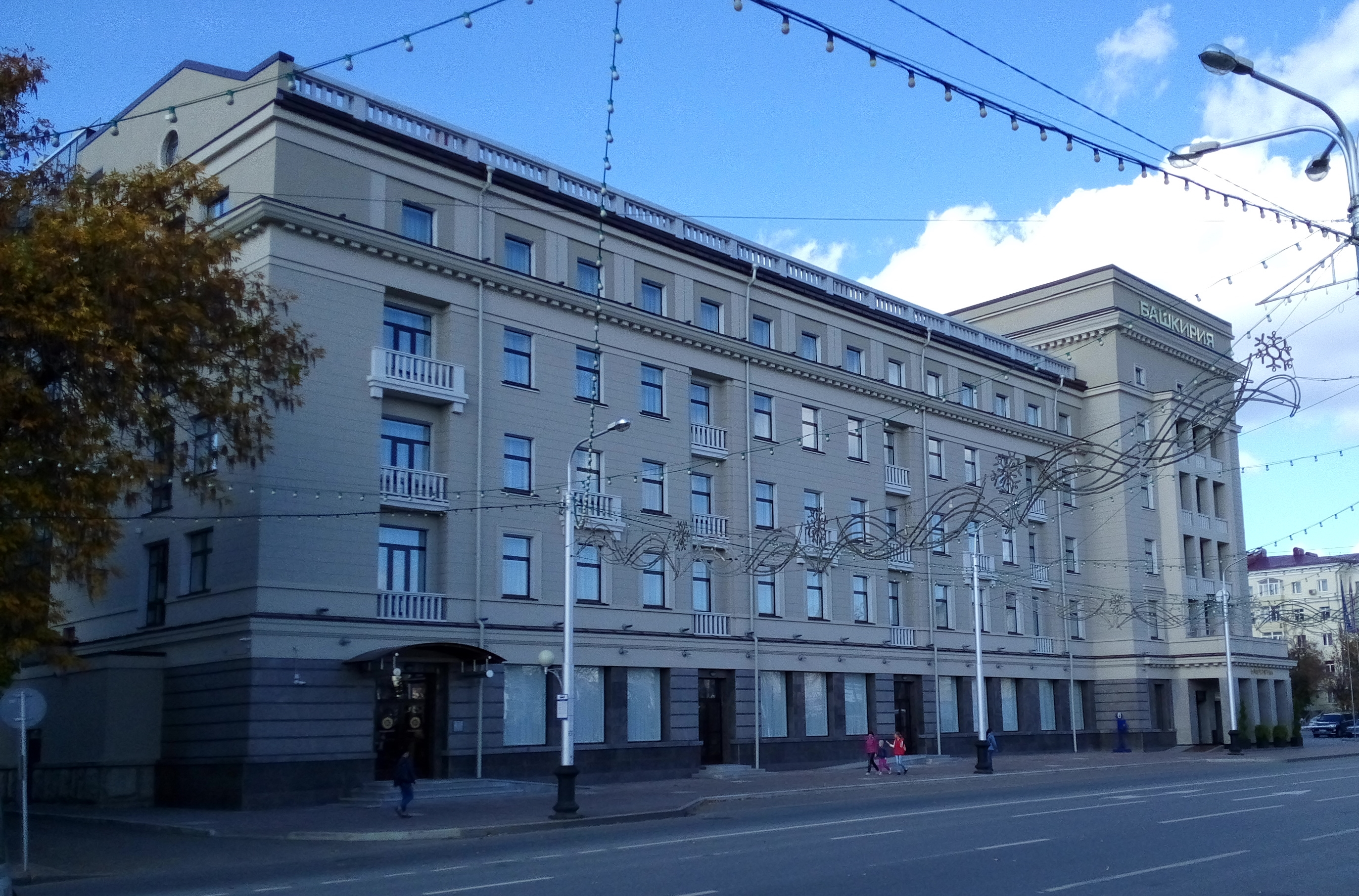 Гостиница "Башкирия": улица Ленина, 25/29, Уфа, Башкортостан